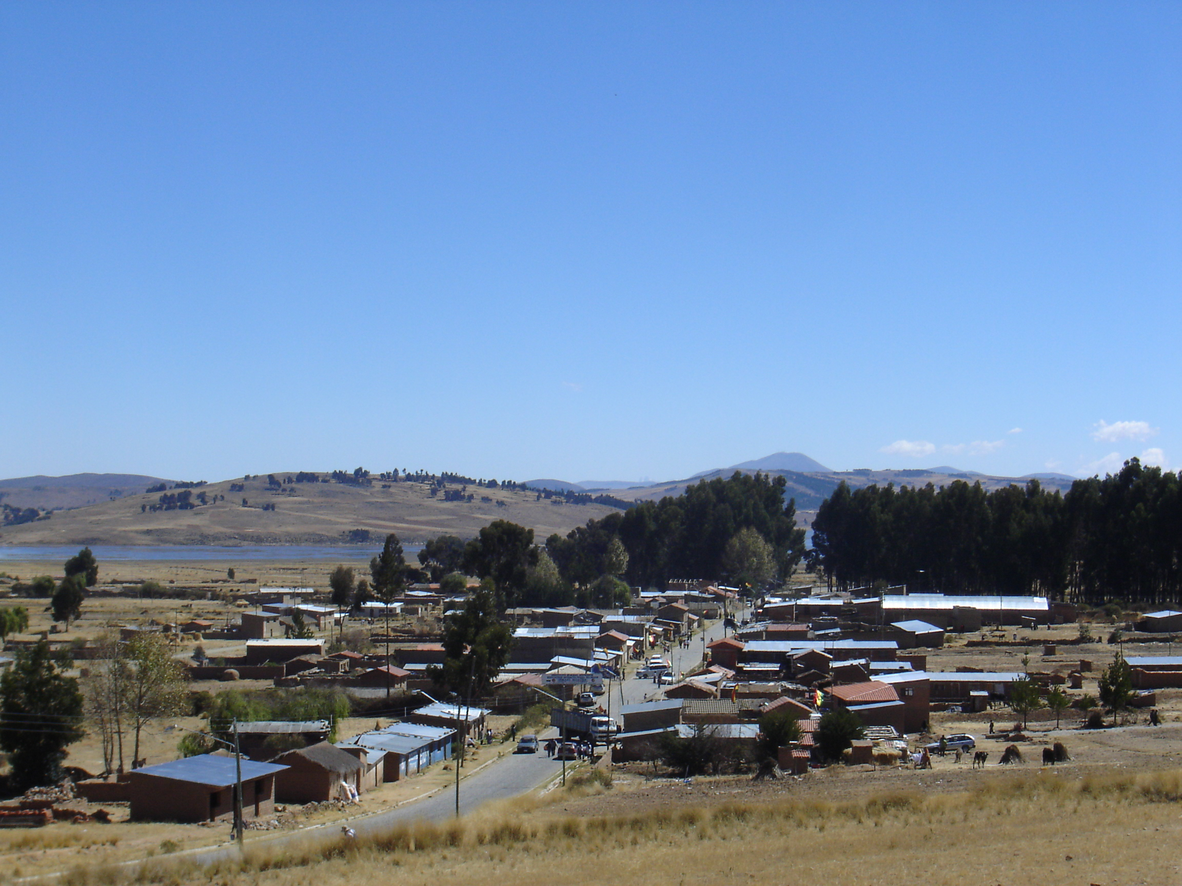 Una vista de la comunidad de Challwamayu que se encuentra a un km. y medio antes de la población de Vacas, sobre el mismo camino que conduce a dicha población. Runa Simi: Juq qhawariy Challwamayu llaqtitamanta, mayqinchus tarikun juq khuskanniyuq kilumitruspi Wak'as llaqtamanta, kikin Wak'asman yanpatapi.